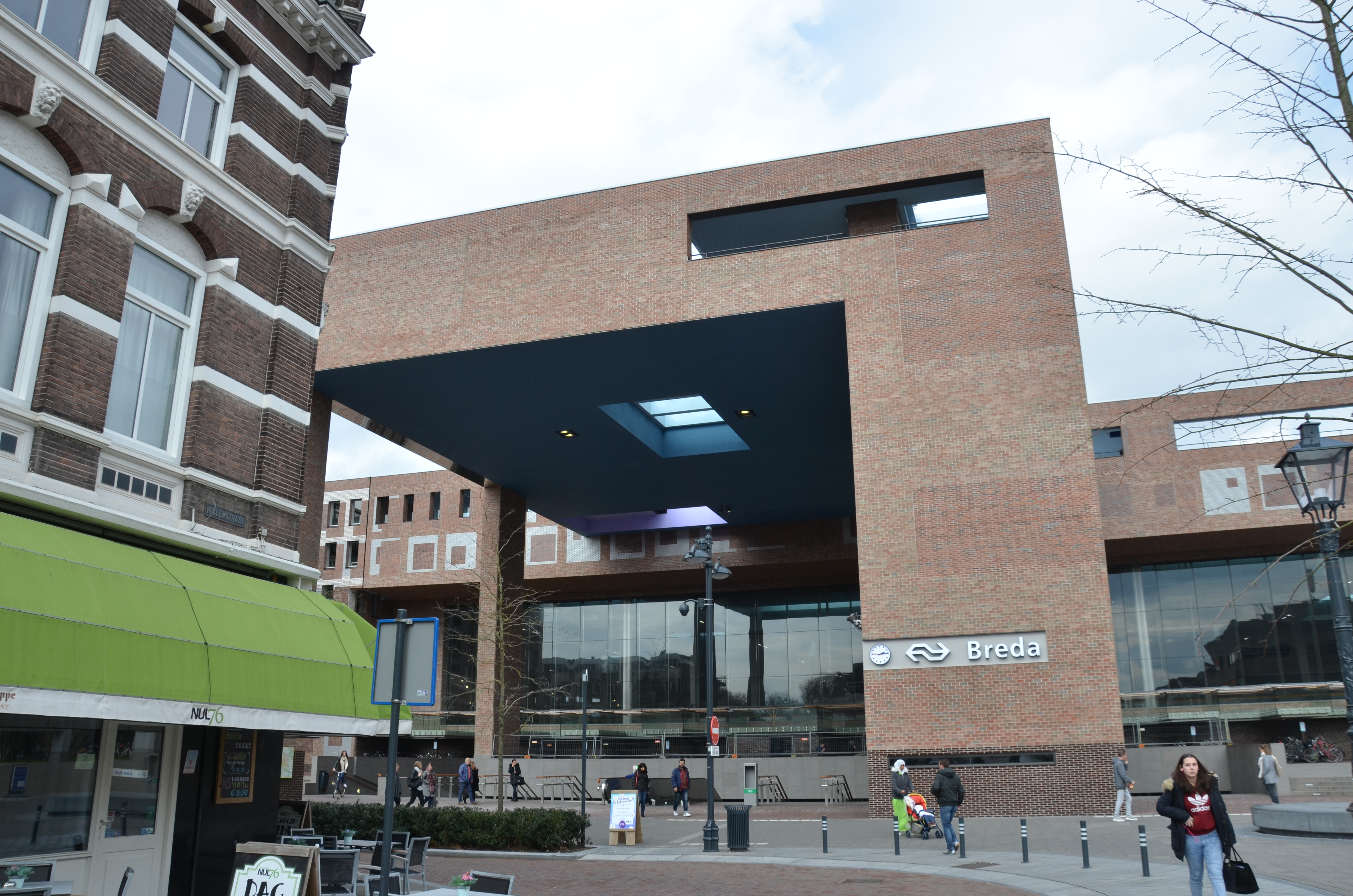 De voorzijde van station Breda anno 2018.